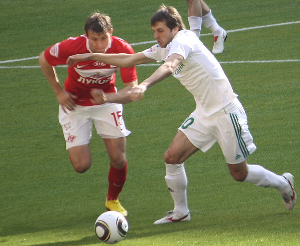 Sergei Parshivlyuk